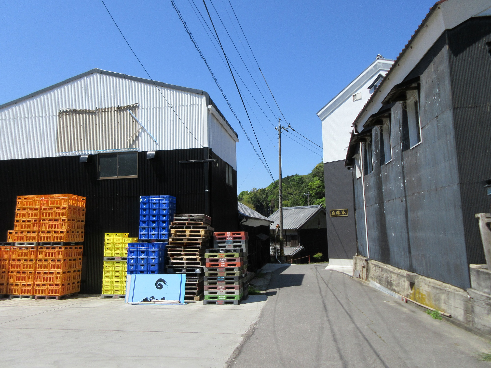 柴田酒造場（岡崎市保久町）